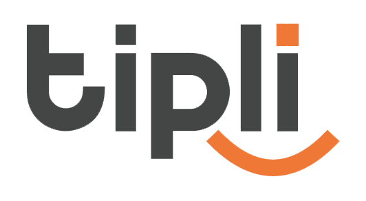 Logo společnosti Tipli s.r.o.